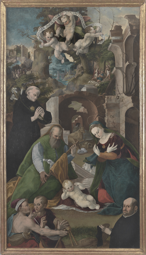 Pinacoteca civica Bruno Molajoli